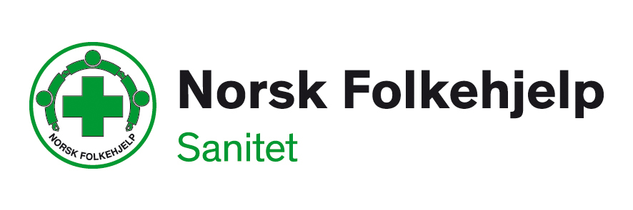 Logo sanitet